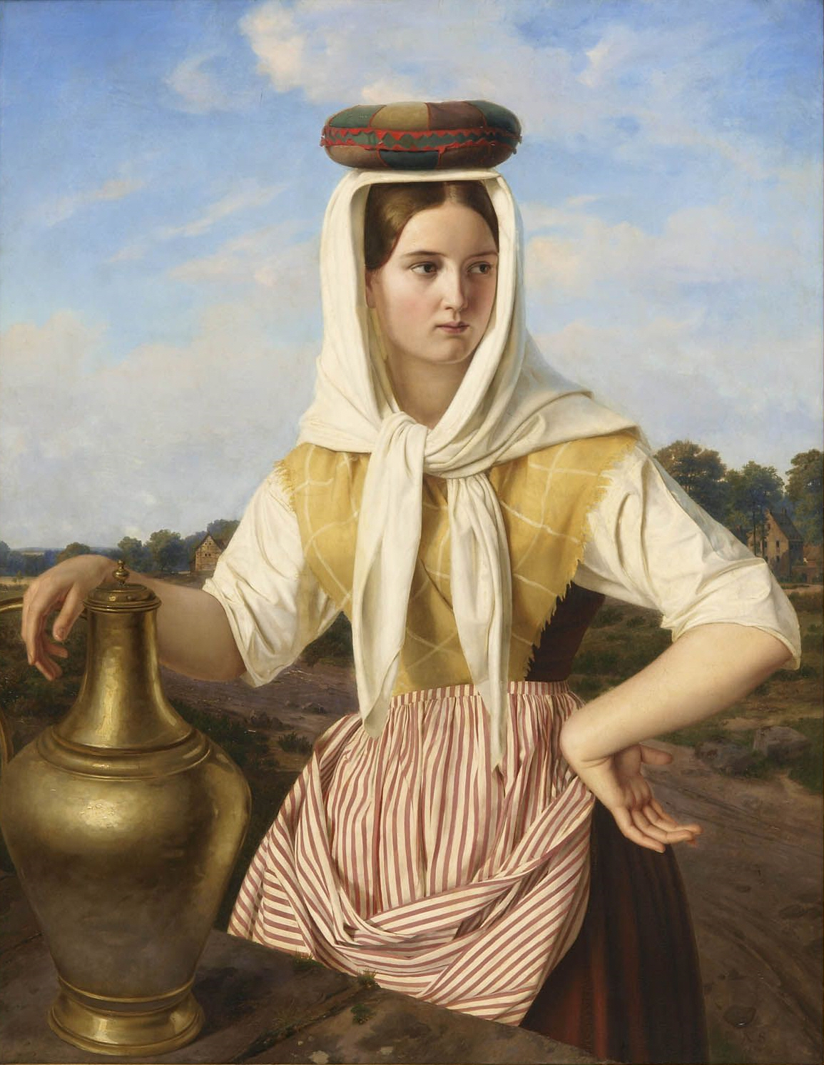 Leihgabe des Westfälischen Kunstvereins